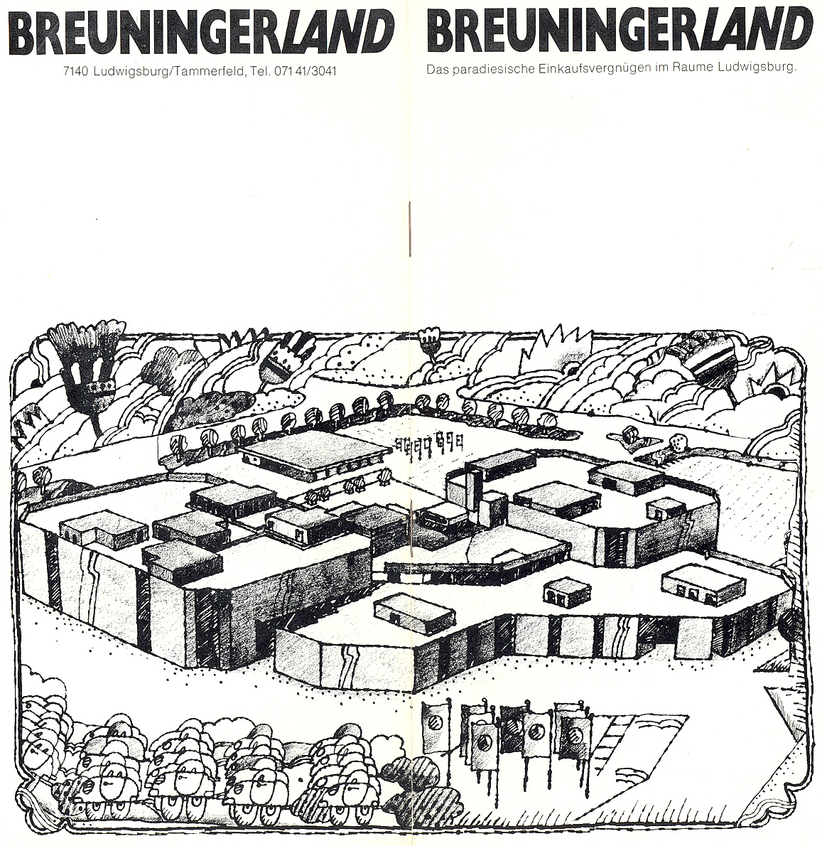 Торговый дом "Бройнингер-ланд" в г. Людвигсбург